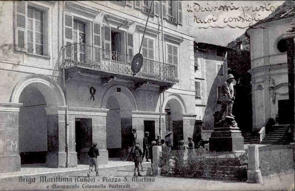 Briga Marittima (ora La Brigue) - 1925